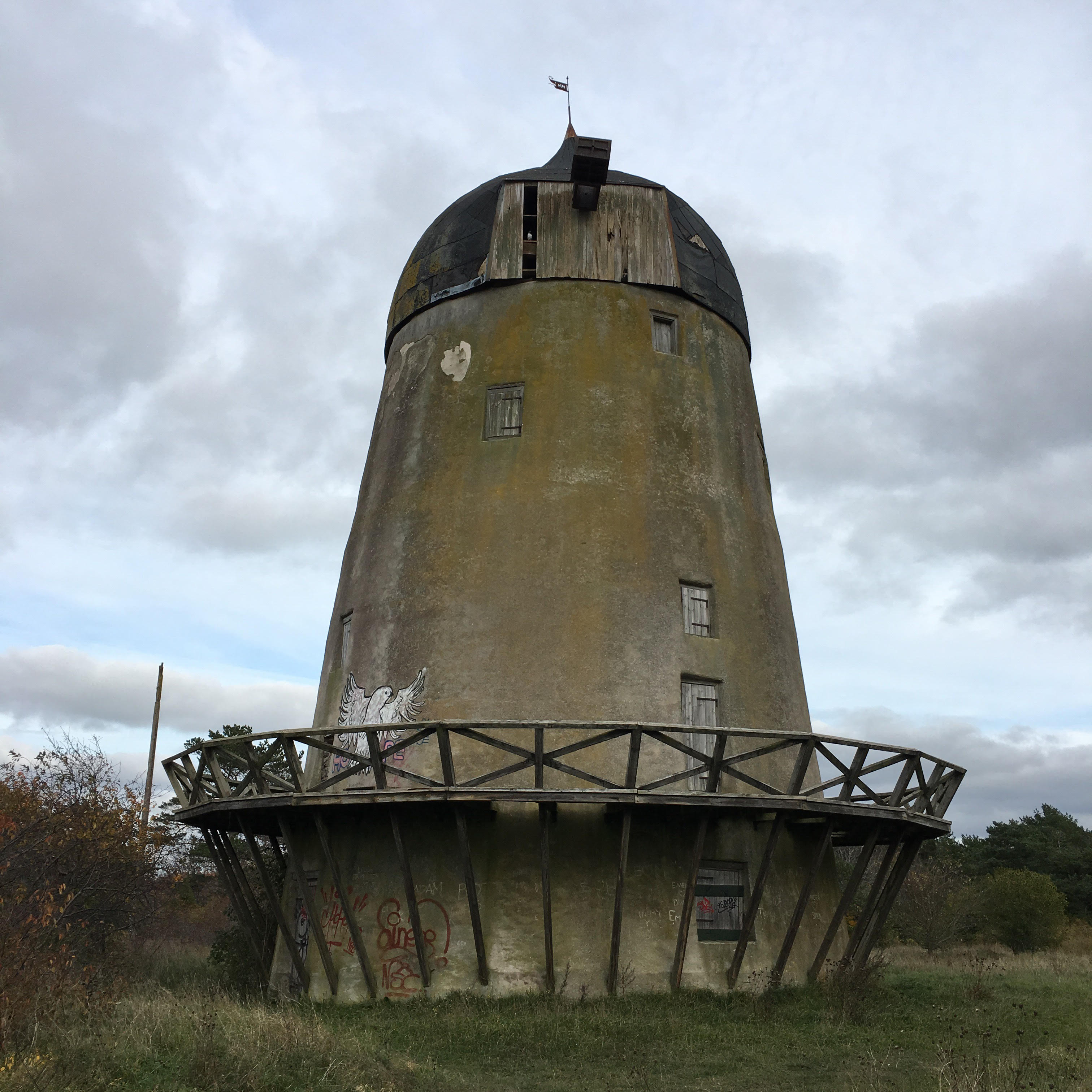 Plågan i Kokkolokkoskogen